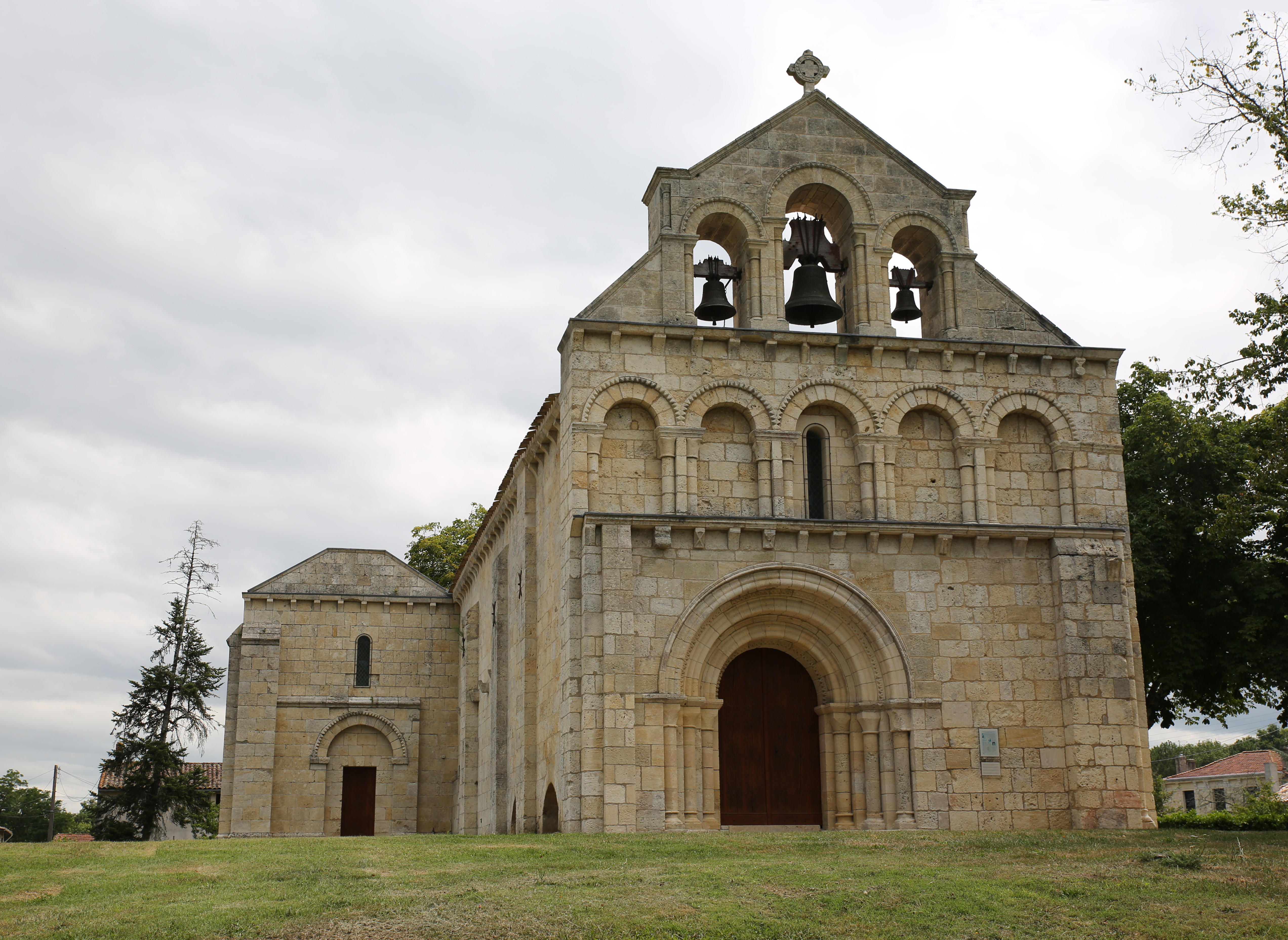 Chapelle de Benon